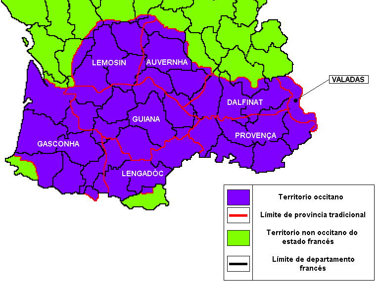 Traditional occitan regions